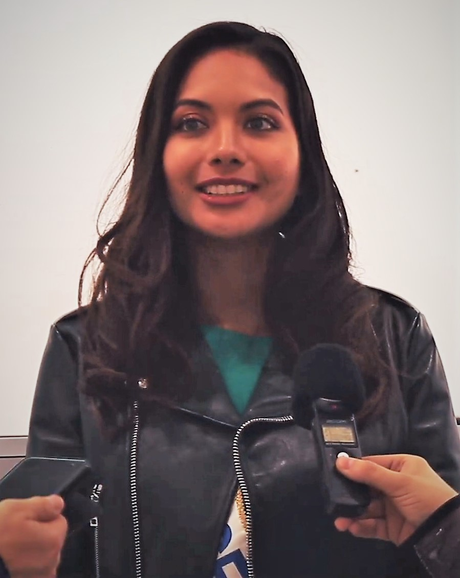 Miss France 2019 (Vaimalama Chaves) en séance de dédicaces à Malemort (19) Vendredi 6 Décembre 2019, La Galerie (Casino Hyper 19) à Malemort sur Corrèze organisait une séance de dédicace avec Vaimalama Chaves - Miss Tahiti 2018 - Miss France 2019 et sa dauphine Aude Destour, Miss Limousin 2018 pour Miss France 2019. Une semaine avant de remettre son titre, Vaimalama réalisait donc sa dernière sortie officielle en tant que Miss France pour le plus grand plaisir des corréziens venus l'admirer. Vaimalama s'est vu également remettre un magnifique bouquet de fleur par le directeur du magasin Géant Casino (Malemort-Sur-Corrèze, Limousin, France). --- Réalisation: Viince Movie's - Suscite l'émotion Organisation: La Galerie (Casino Hyper 19) Interviews: La Montagne Brive & Breniges FM